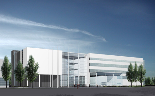 Jyväskylän IT-Talo DYNAMO